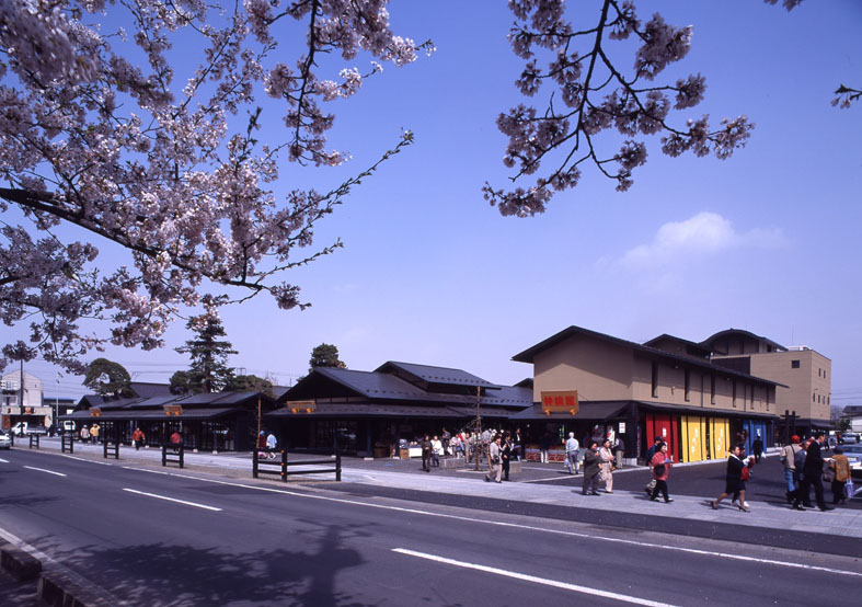 津軽藩ねぷた村の施設外観図